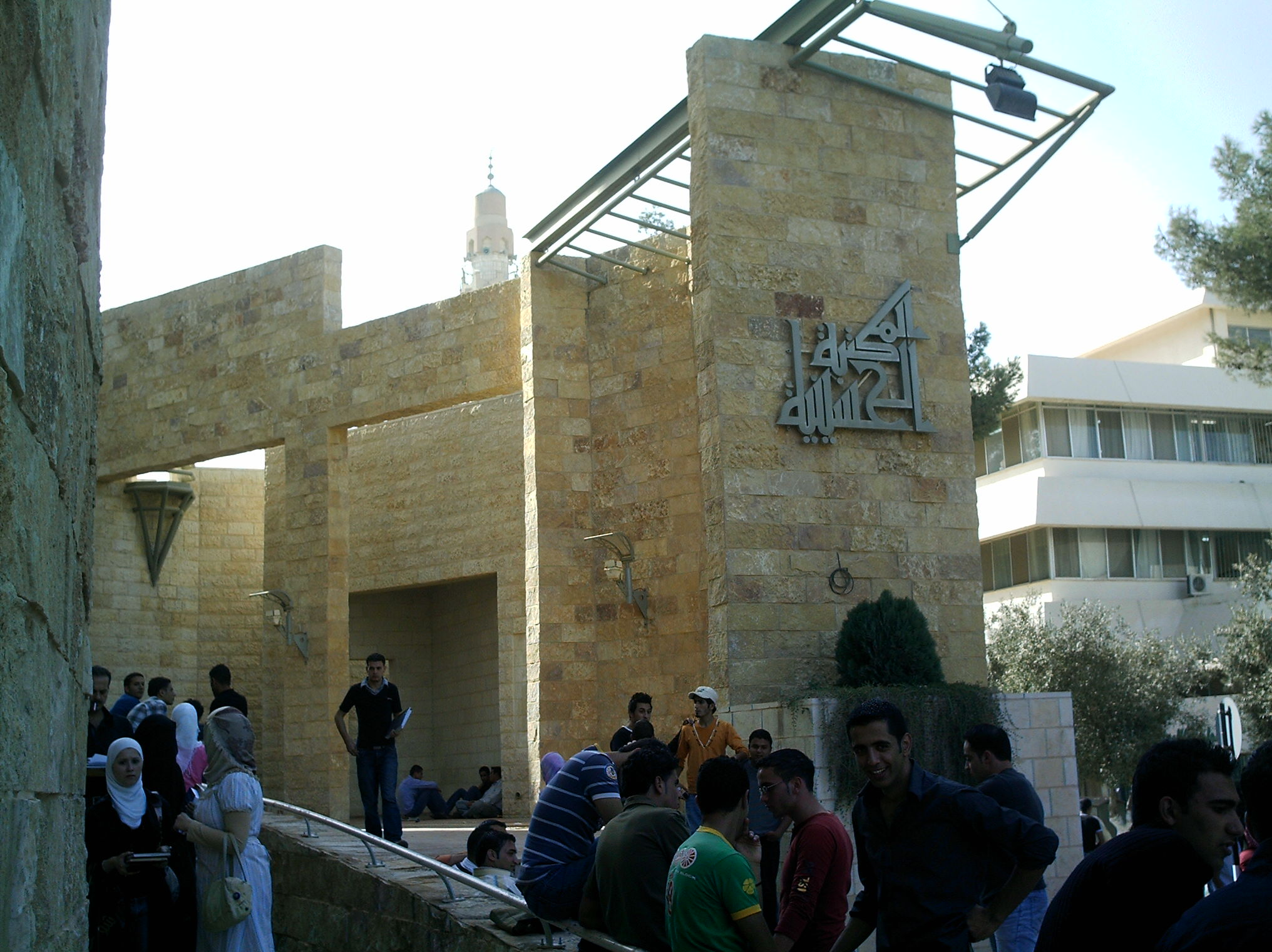 صورة لمبنى المكتبة في جامعة اليرموك، التي تقع في محافظة إربد شمال المملكة الأردنية الهاشمية